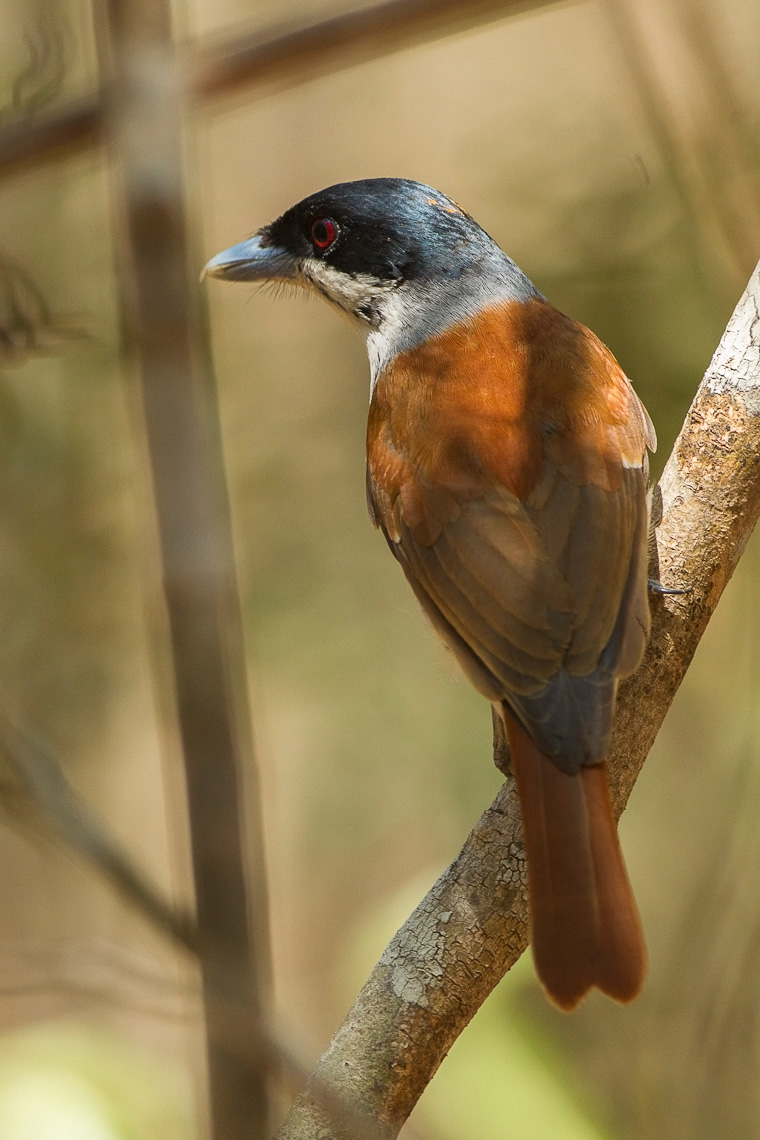 Rufous Vanga - Ankarafantsika - Madagascar_S4E9434